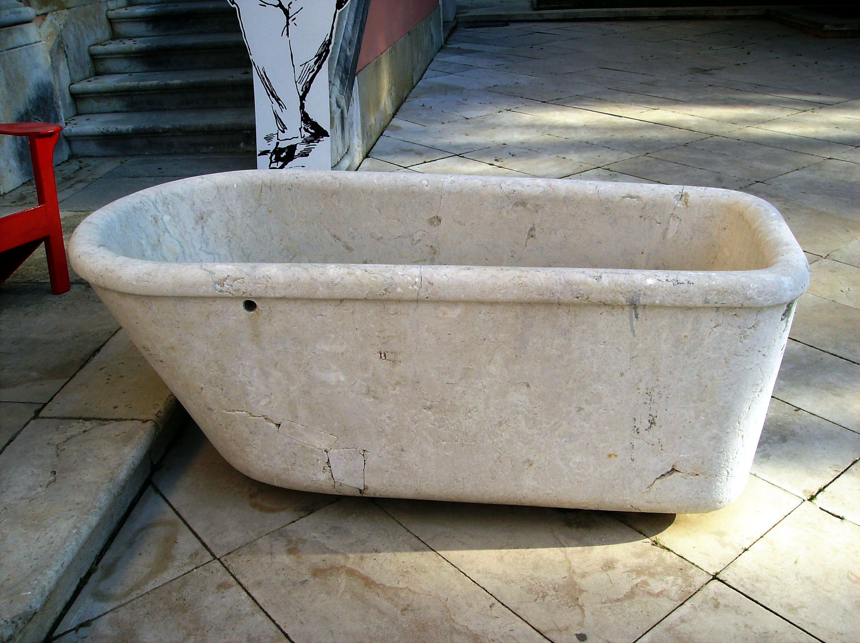 Museu do Hospital e das Caldas, Caldas da Rainha, Portugal: antiga banheira em pedra.